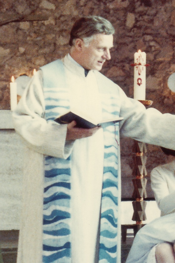 Lothar Zenetti während eines Taufgottesdienstes in der Frankfurter Kirche St. Wendel im Oktober 1978